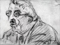 Ο συγγραφέας Παύλος Νιρβάνας. Σκίτσο του Γεώργιου Ιακωβίδη.